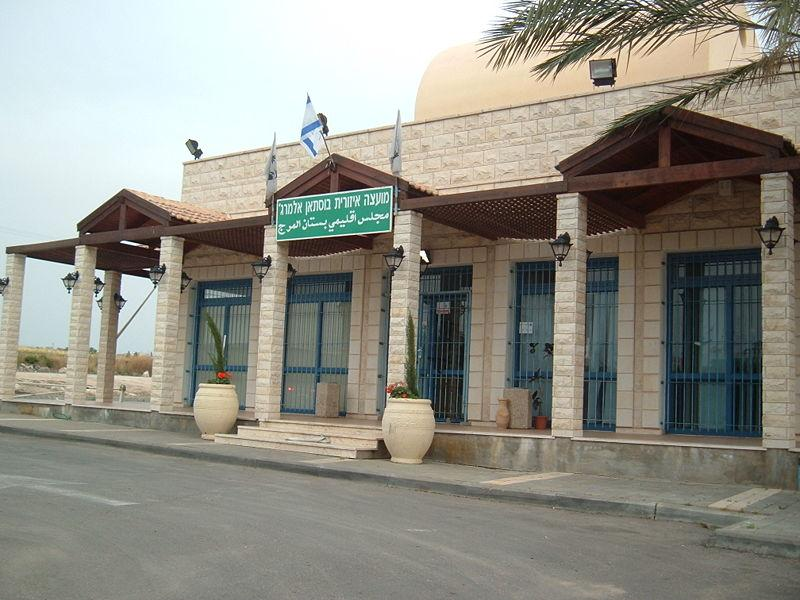 the offices of regional council Bustan-El-Marj, Israel, located in a gas station near McDonald's restaurant outside Kafr-Nein.משרדי המועצה האזורית בוסתאן אל מרג', ישראל, הממוקמים בתחנת דלק מחוץ למסעדת מקדונלד'ס בכניסה לכפר נין.